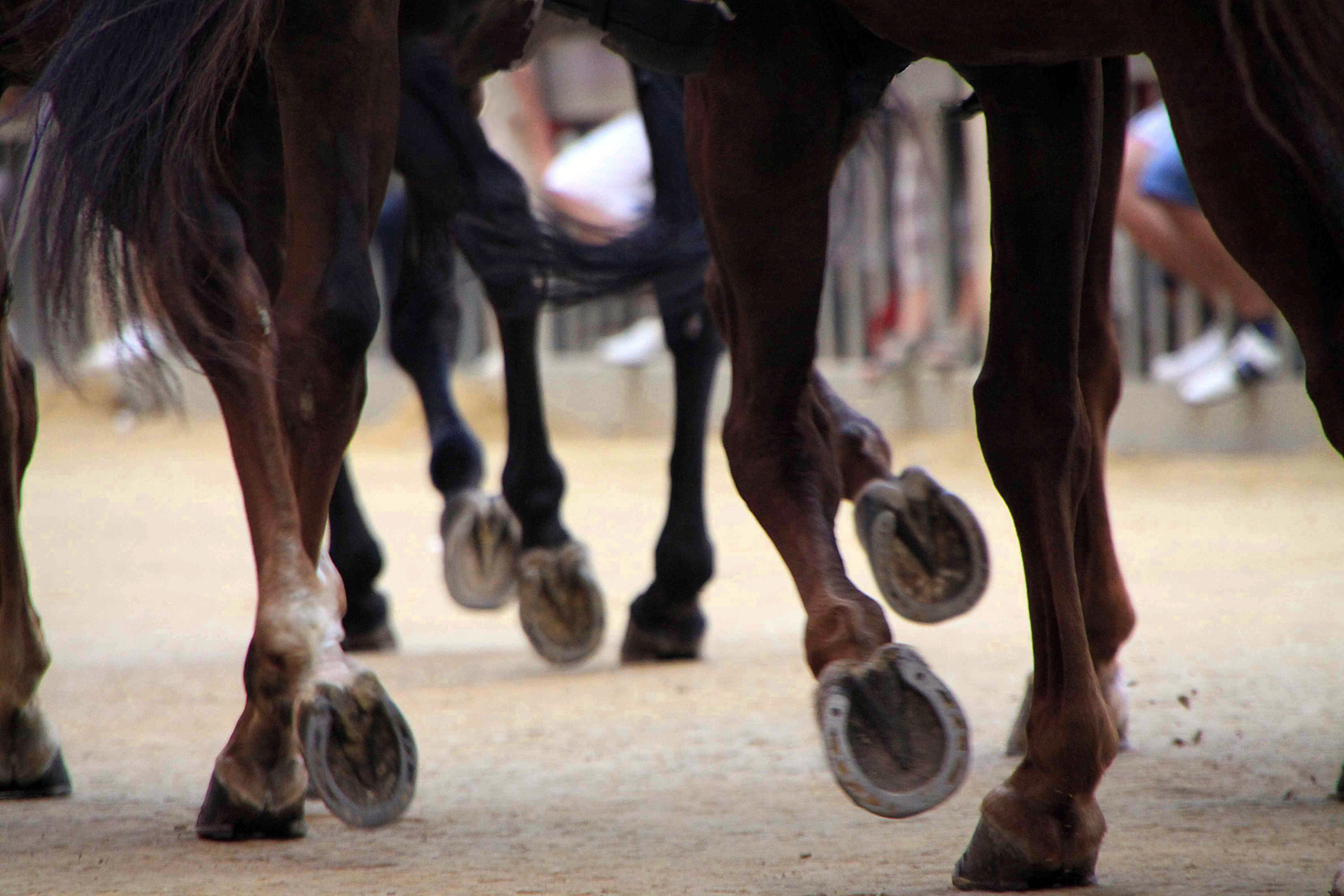 Cavalli in corsa sul tufo di Piazza del Campo